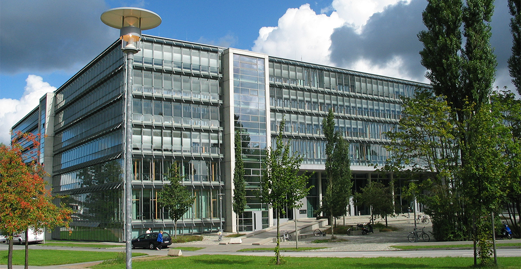 Gebäude von der Straßenansicht, Haupteingang